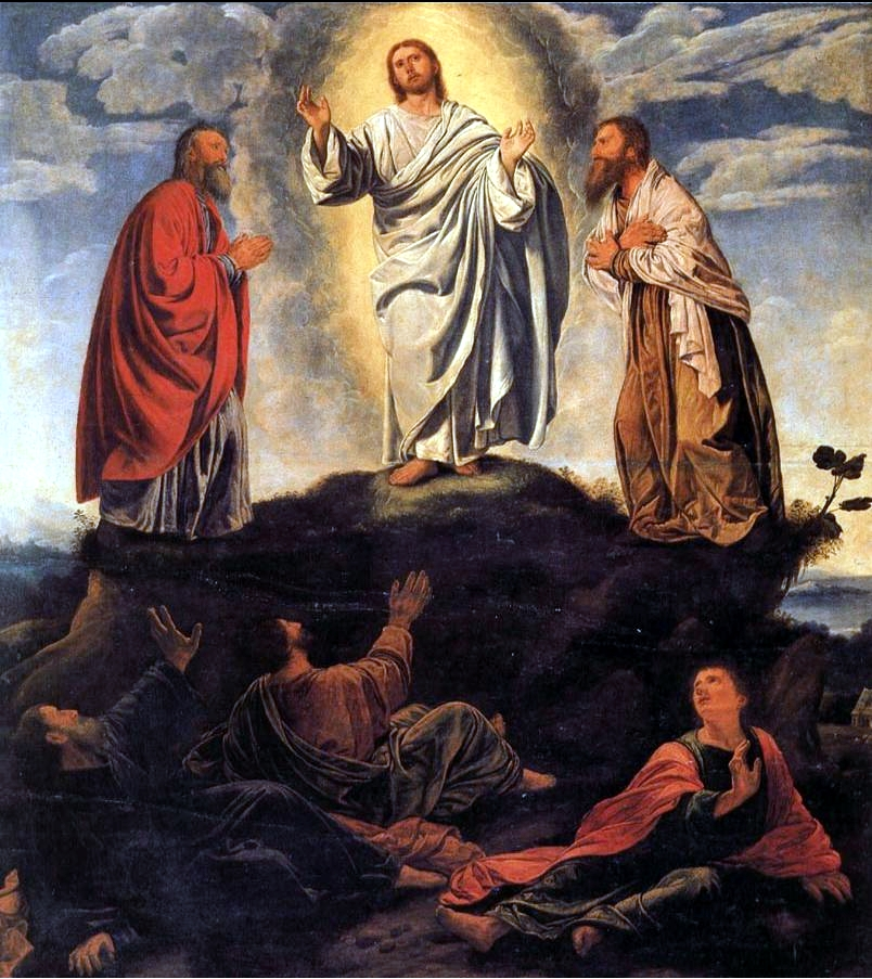 Transfiguration